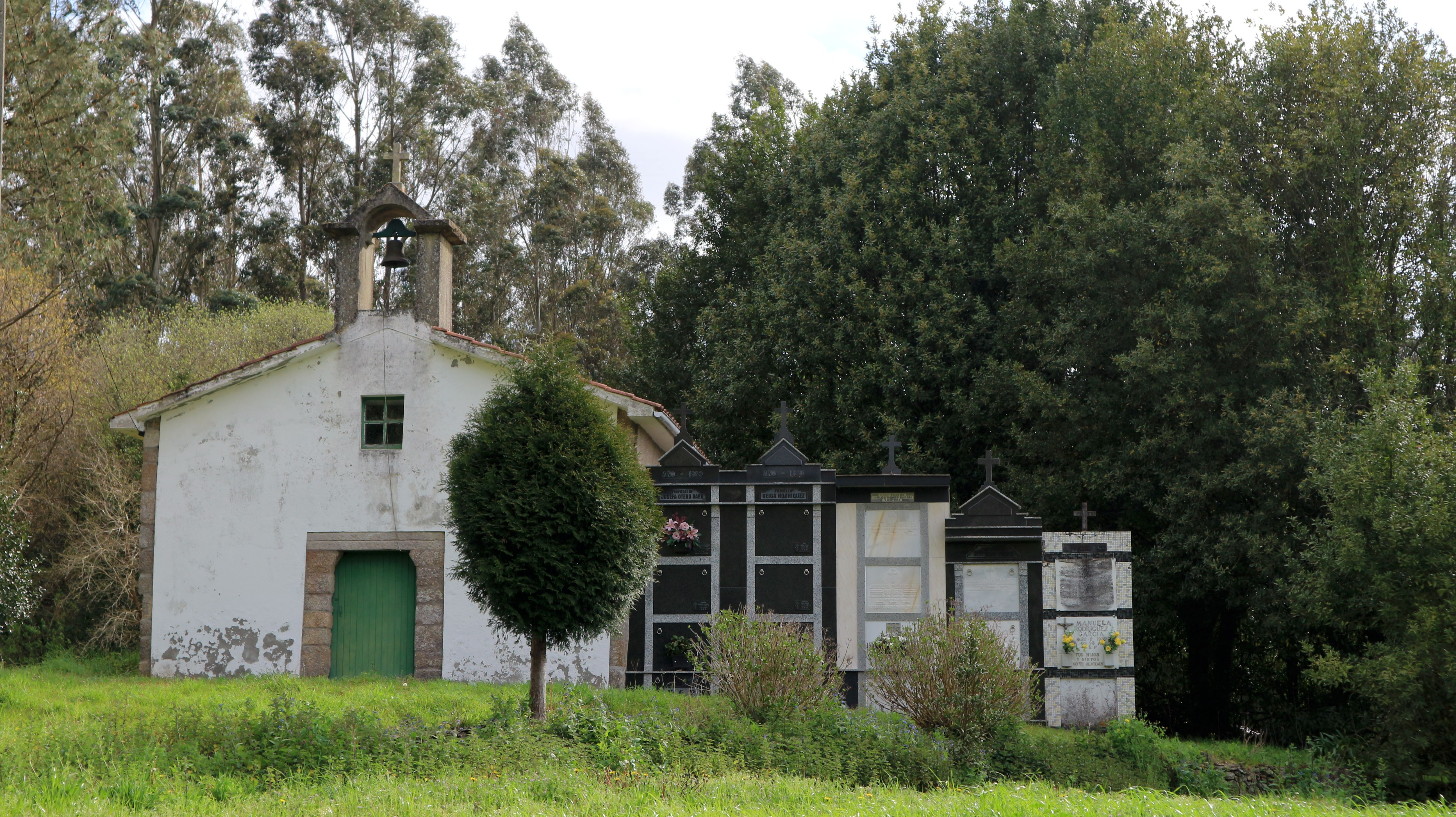 Igrexa de Santo Estevo de Vivente. Vivente, Oza-Cesuras.